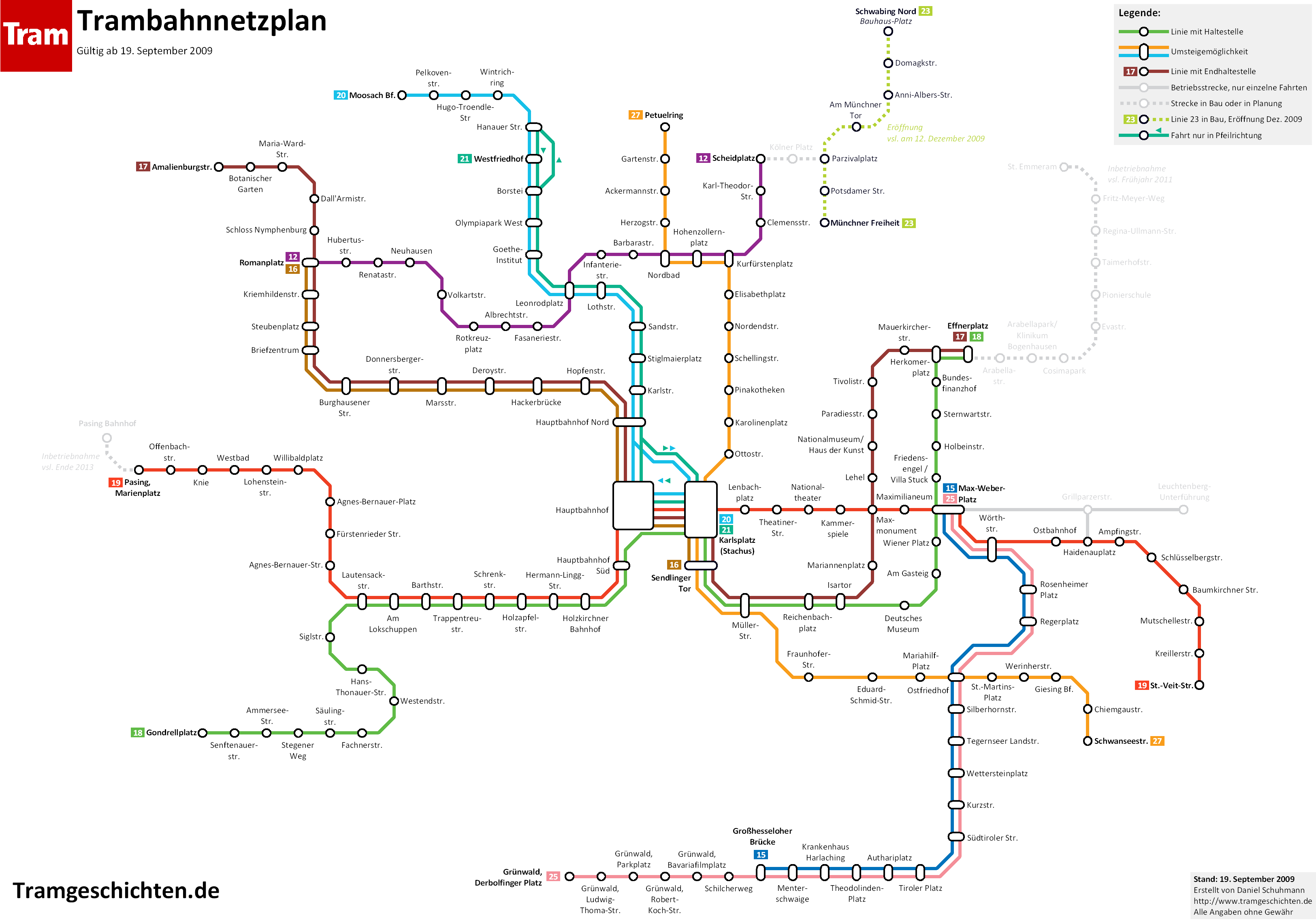 Aktuelles Trambahnnetz ab 19. September 2009, Baustellenlinien entfernt